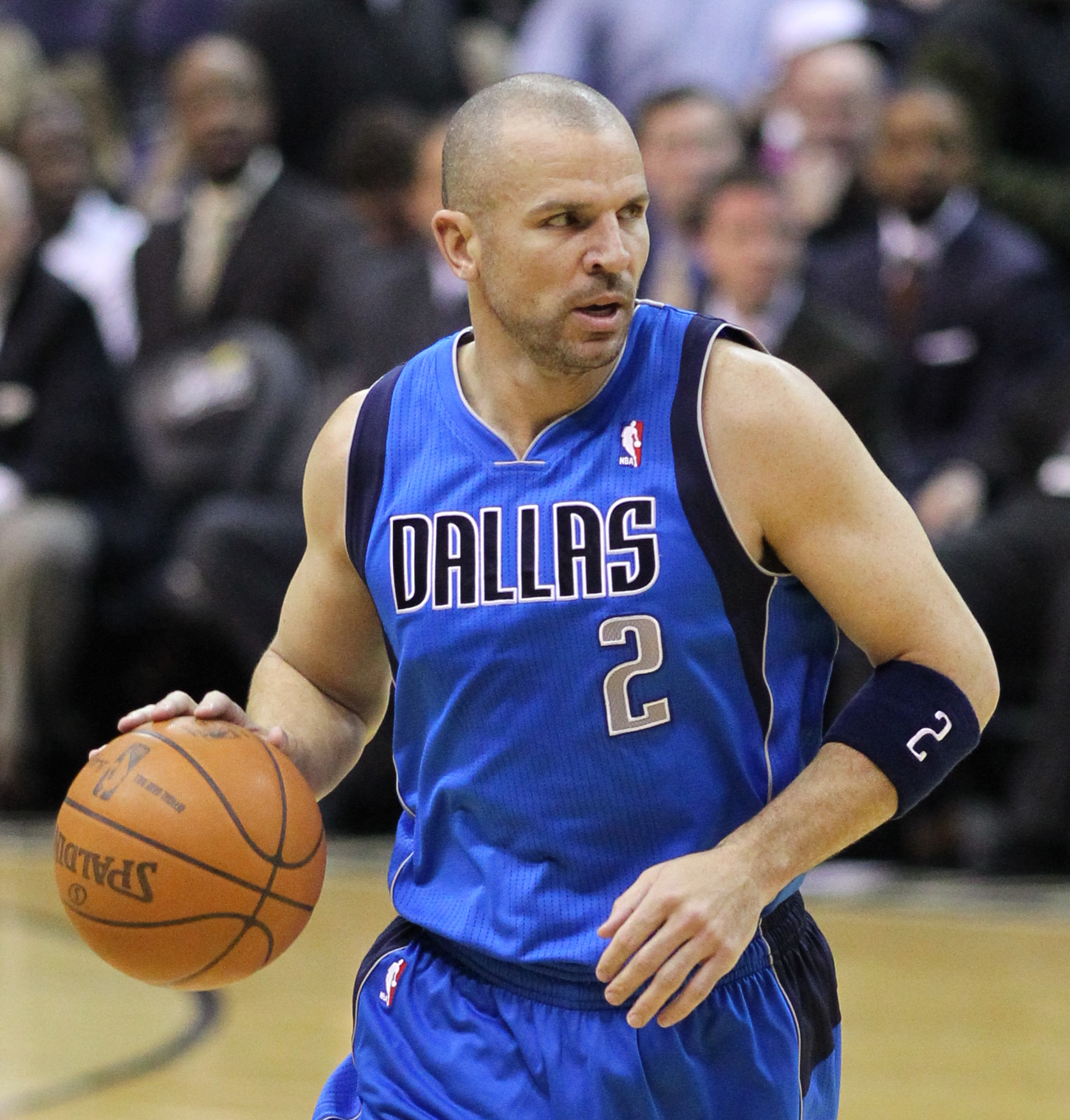 Wizards v/s Mavericks 02/26/11